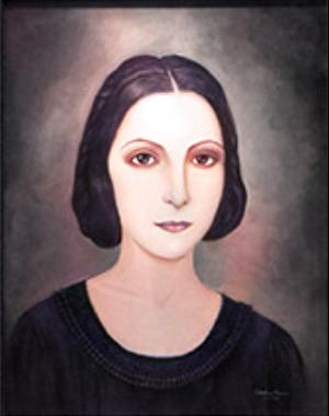 María Feliciana de los Ángeles Miranda